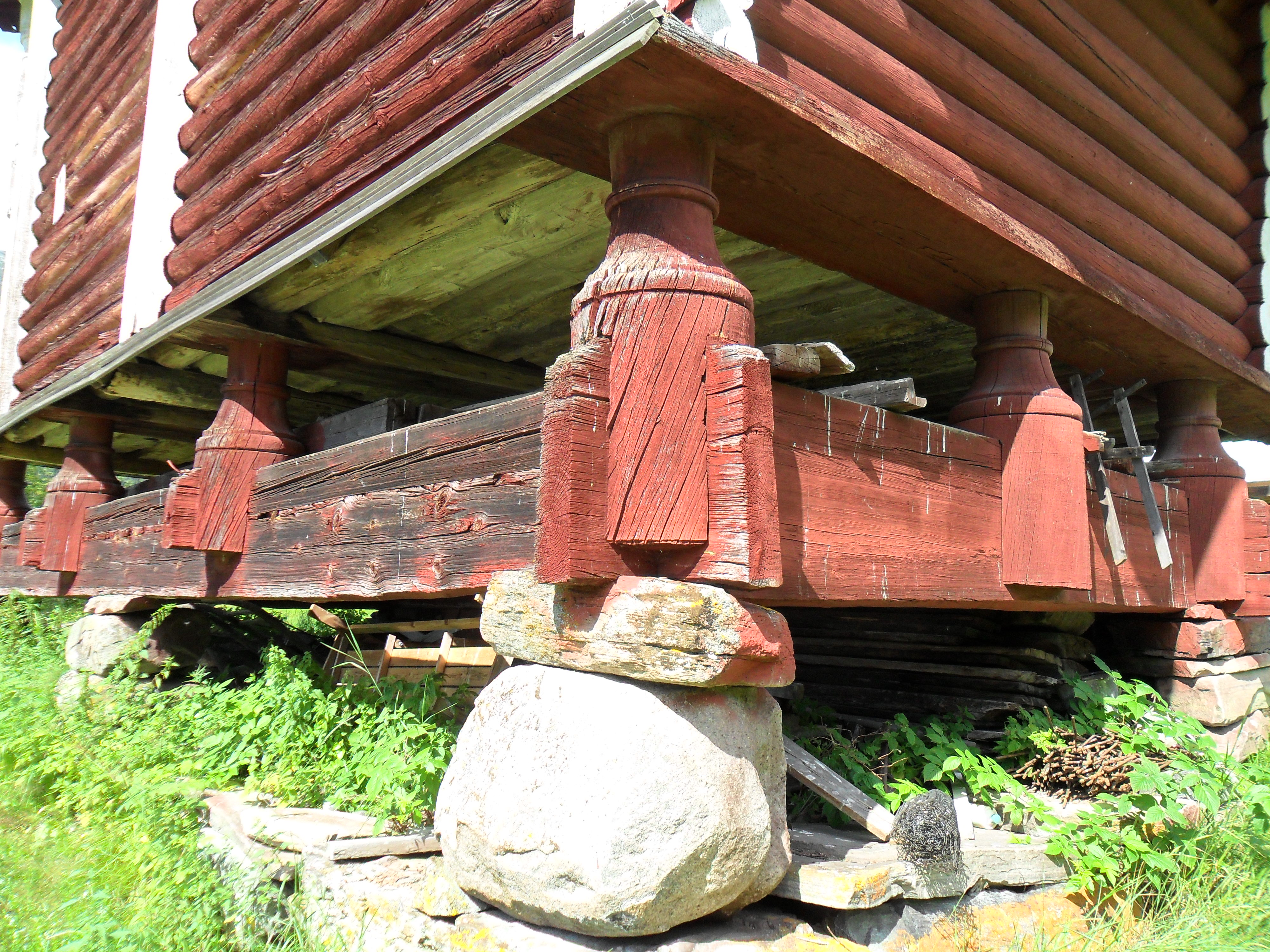 Middelalderloftet Kravik Mellom i Nore & Uvdal kommune, Buskerud.